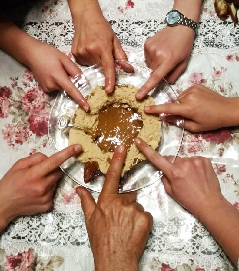 טקס בסיסה